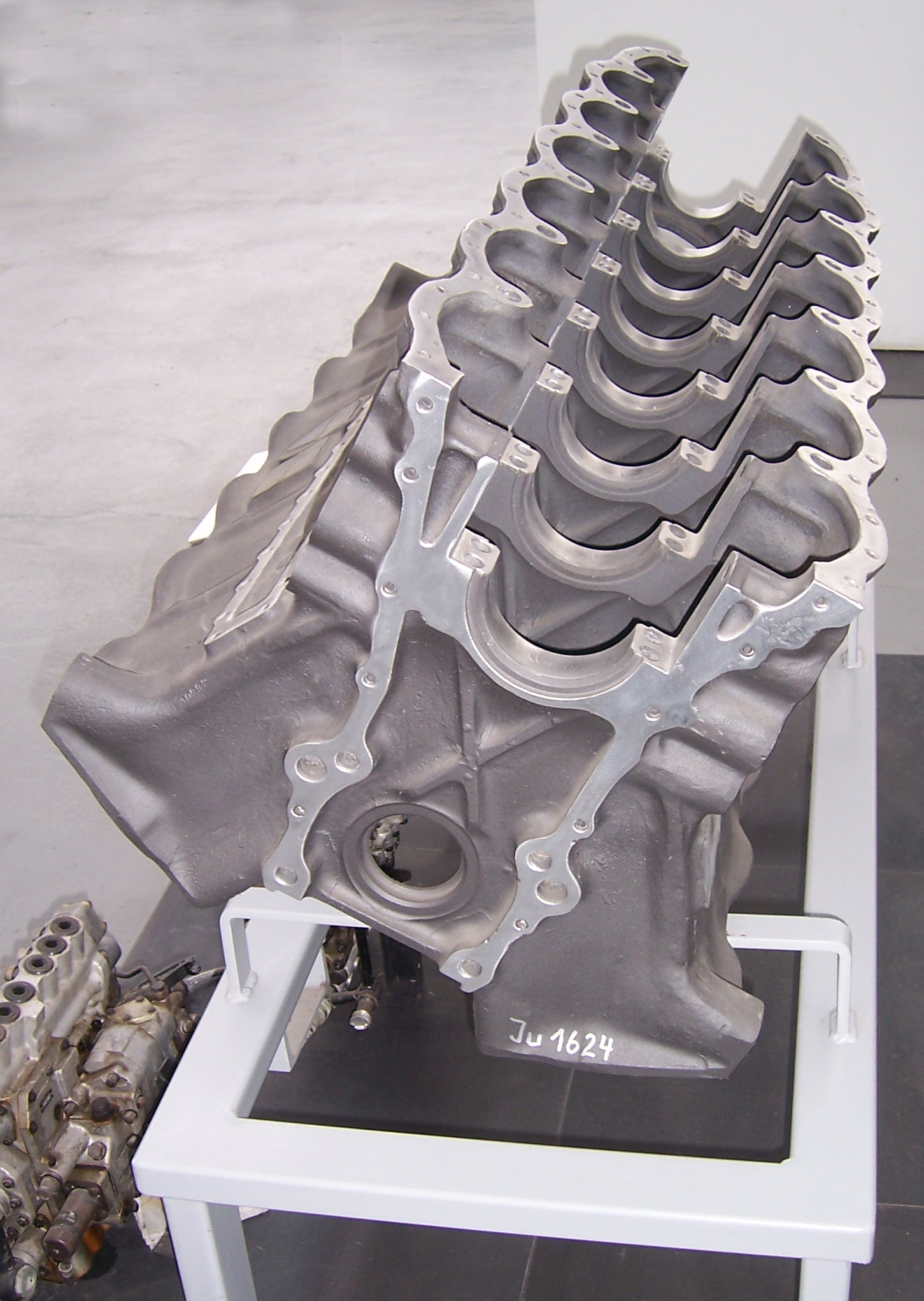 Jumo 211 Motorgehäuse und Einspritzpumpen im Technikmuseum Hugo Junkers Dessau